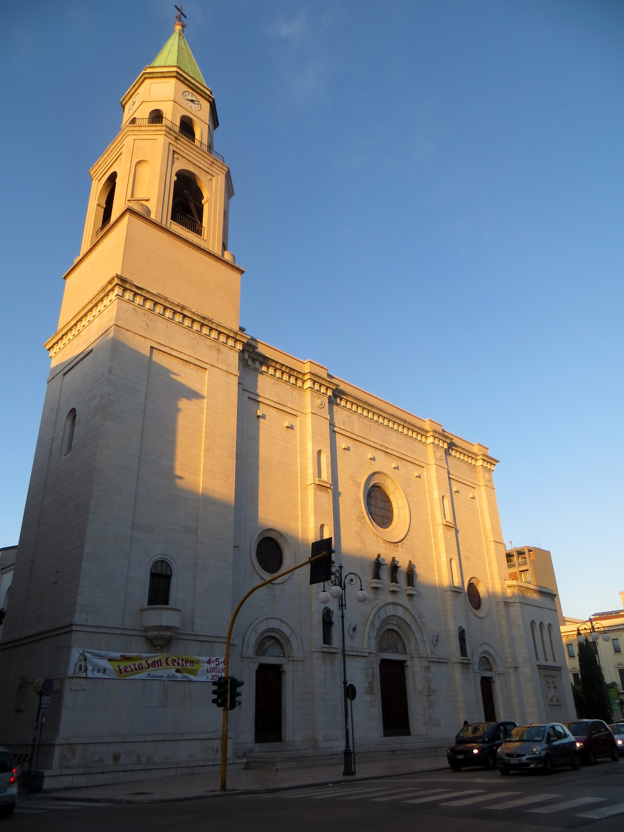 Duomo di San Cetteo a Pescara